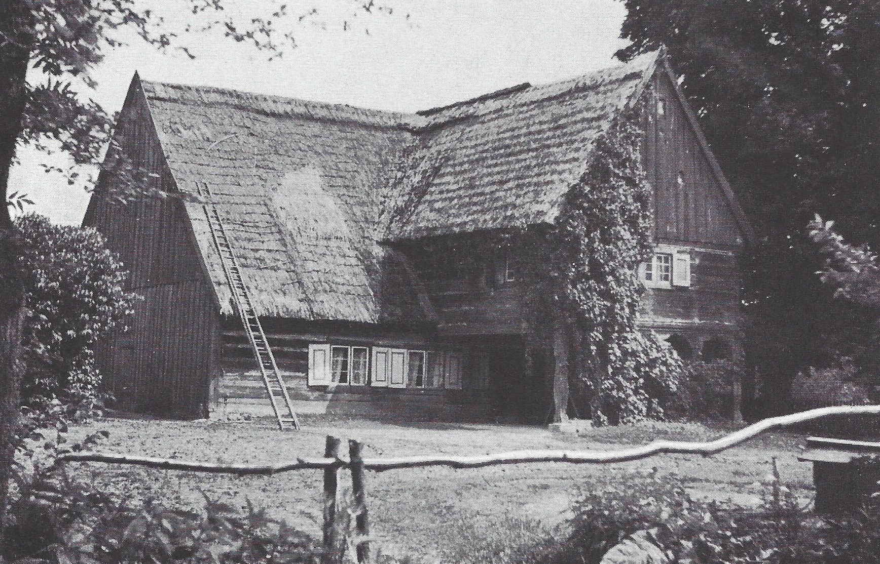 Vorlaubenhaus in Dumbeln, Ostpreußen